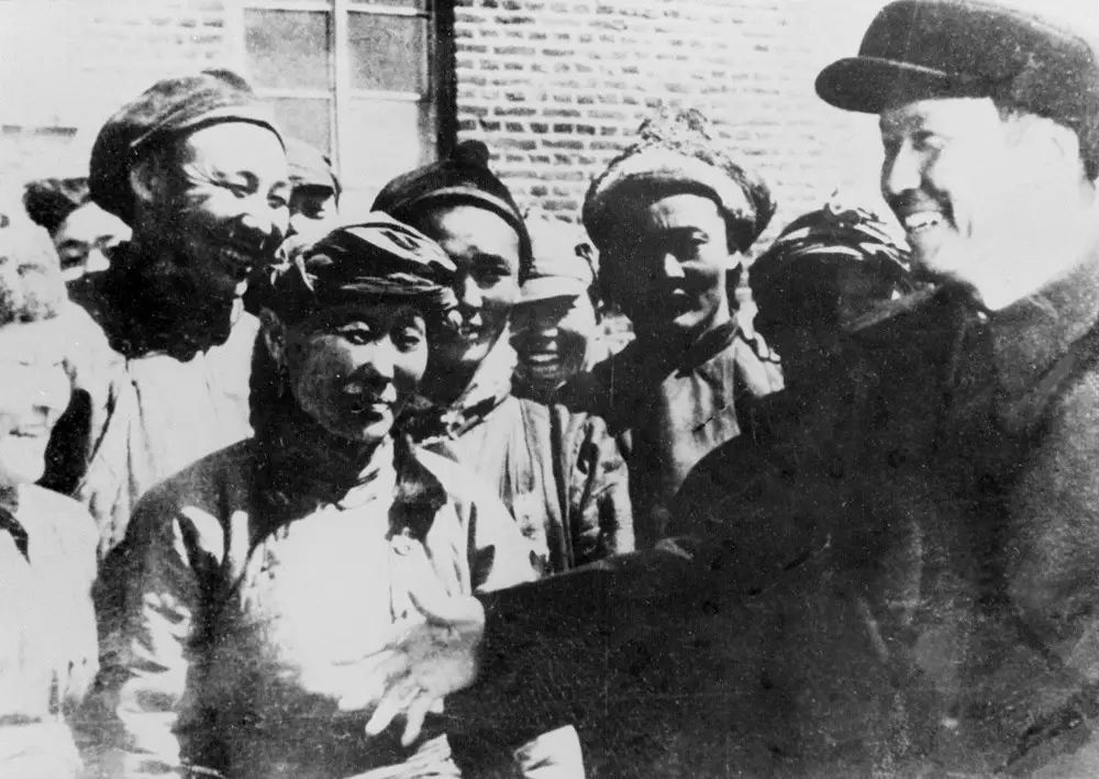 原图注：内蒙古人民代表会议期间，乌兰夫（右一）与参加会议的牧民代表交谈（1947年4月23日摄）。 新华社发